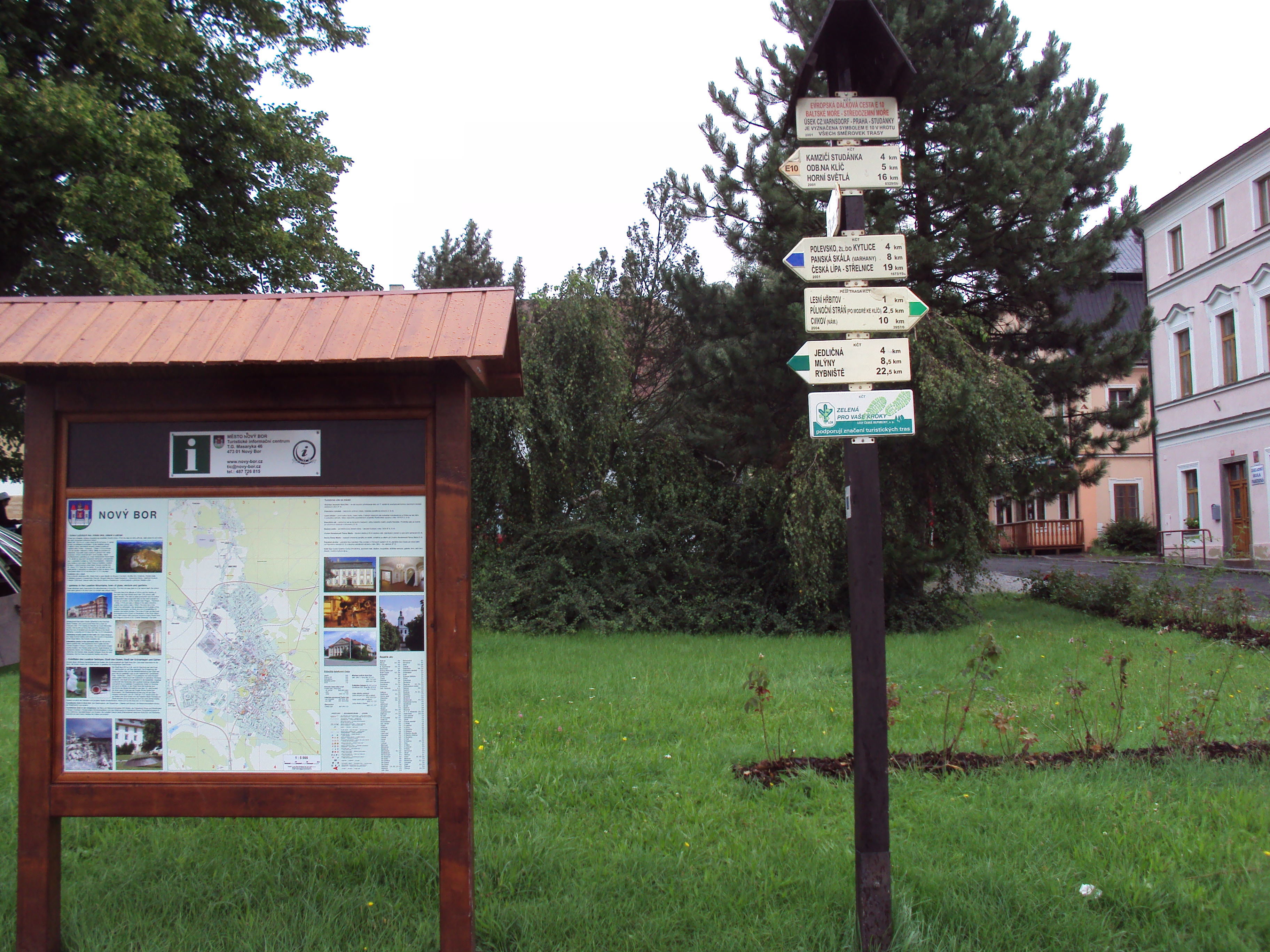 Rozcestník i infodeska pro turisty na nám.Míru v Novém Boru